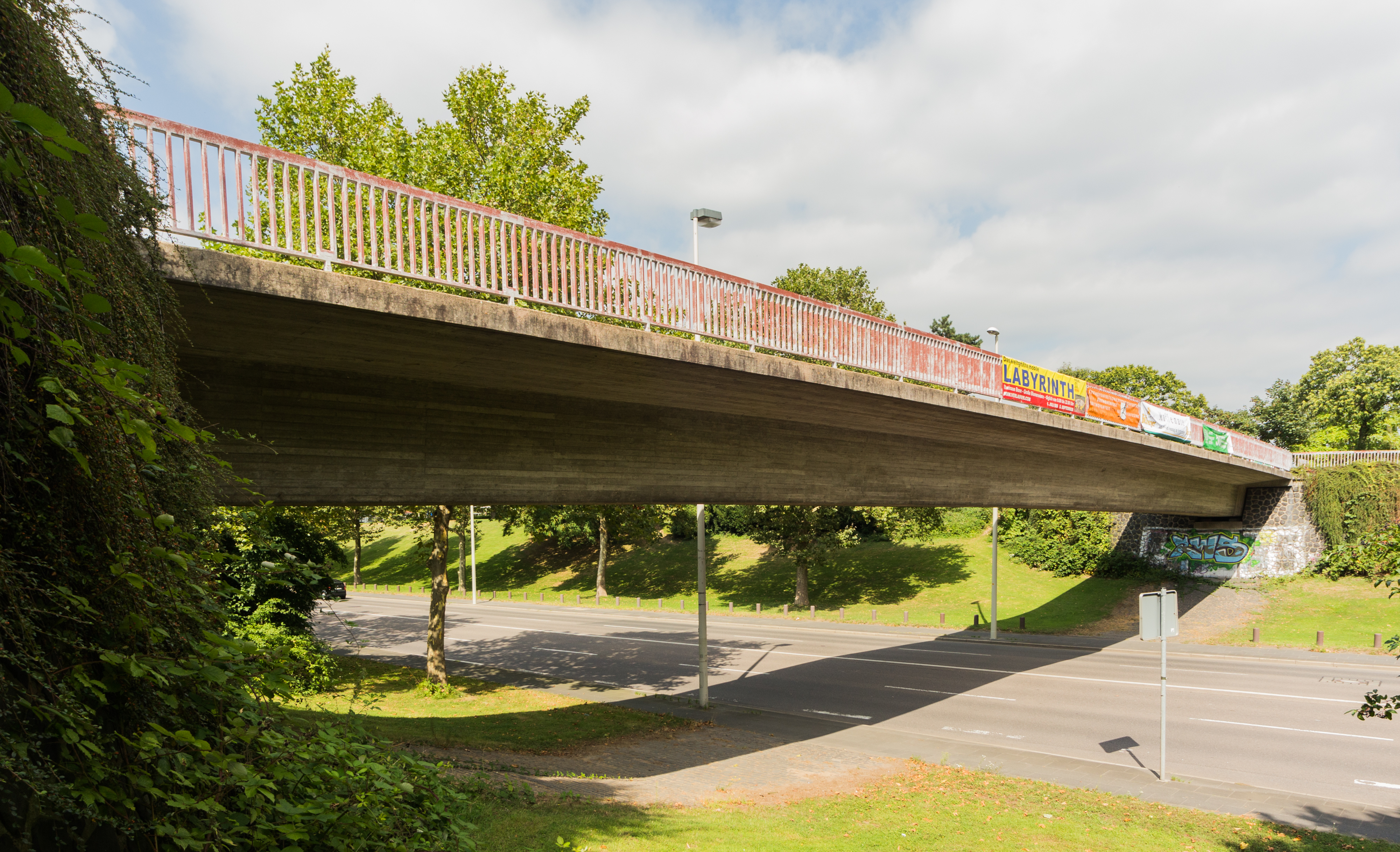 Pedestrian walk across Ludwig-Erhard-Allee, Rheinaue, Bonn